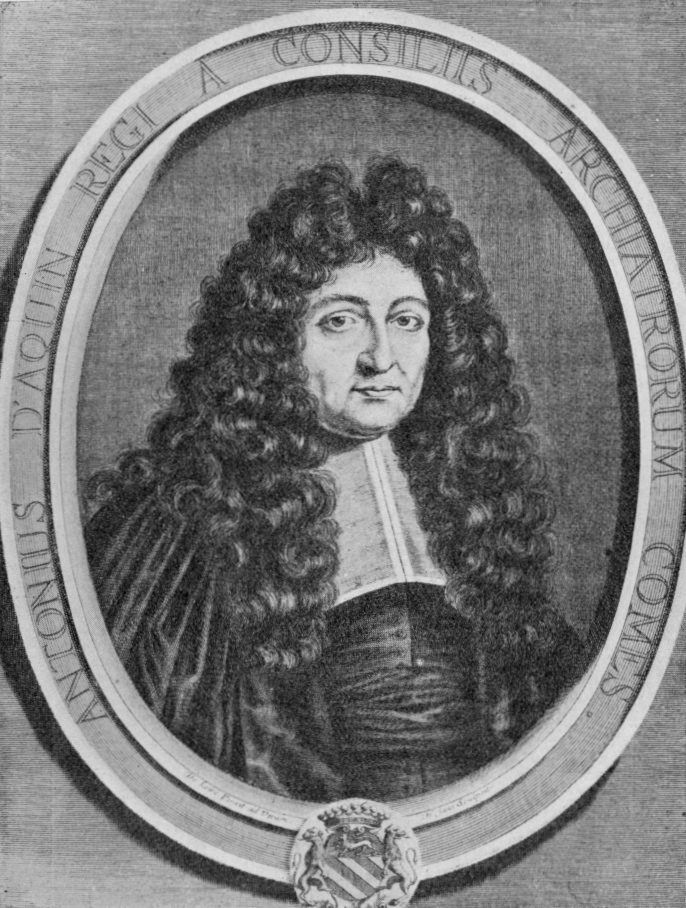 Antoine d'Aquin